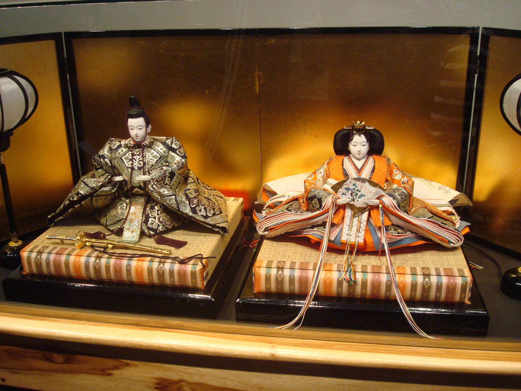 Muñecas japonesas expuestas en el Festival Hinamatsuri en el Museo Nacional de Costa Rica, marzo 2013.